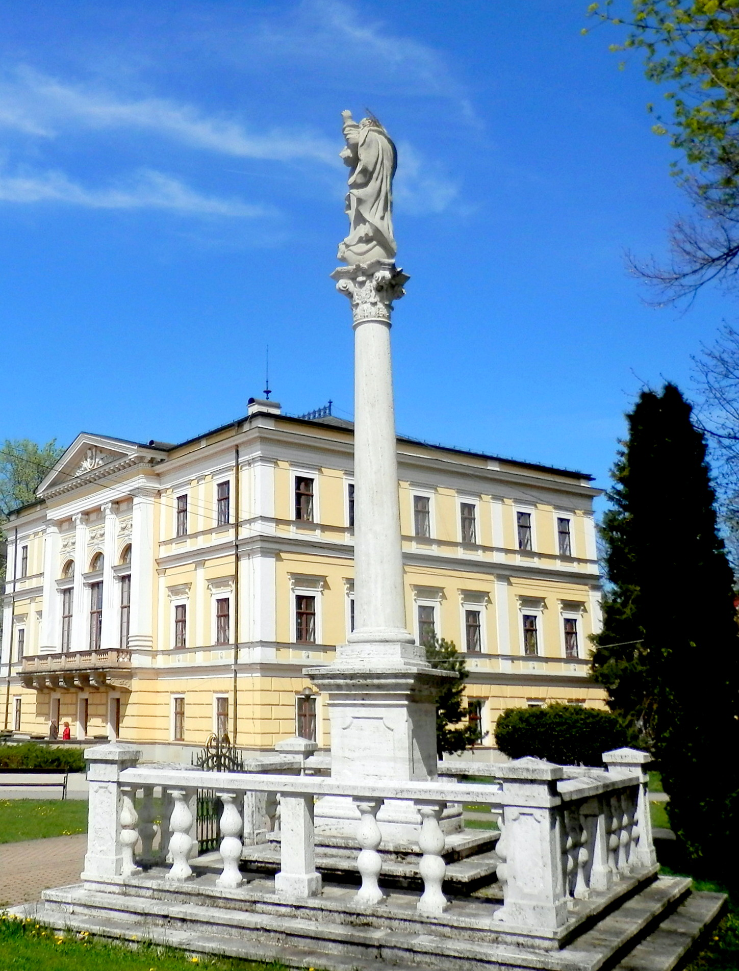 Barokový stĺp pod sochou Panny Márie s podstavcom (Mariánsky stĺp) je vedený v zozname národných kultúrnych pamiatok SR. Doba vzniku 1724. Baroková socha Panna Mária-Immaculata (Nepoškvrnená Panna Mária) je vedená v zozname národných kultúrnych pamiatok SR. Doba vzniku 1724. Radničné námestie. Mesto Spišská Nová Ves.